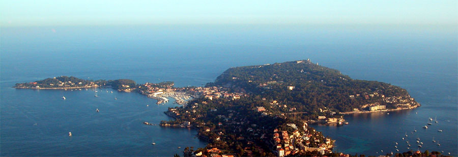 (Polotok Cap Ferrat ob Azurni obali (Cote-d'Azur))